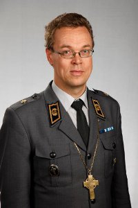 Kenttapiispa Pekka Särkiö